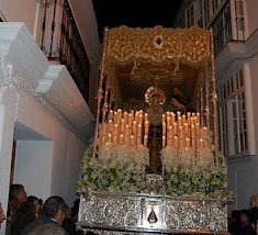 Dolores (nazarena) de Chiclana